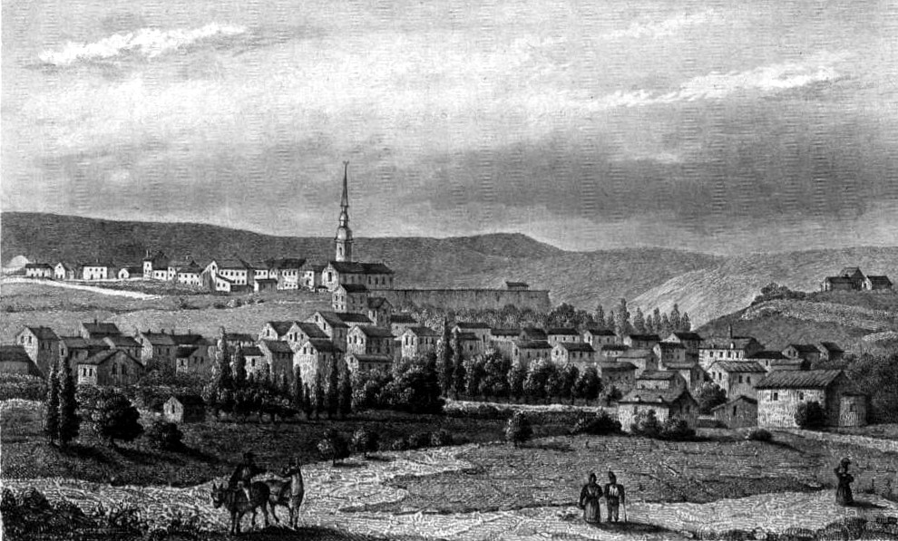 « Bourbonne les Bains » Image en provenance du livre : Eusèbe Girault de Saint-Fargeau, Guide pittoresque du voyageur en France, contenant la statistique et la description complète des quatre-vingt-six départements, orné de 740 vignettes et portraits gravés sur acier, de quatre-vingt-six cartes de départements et d'une grande carte routière de la France, par une Société de gens de lettres, de géographes et d'artistes, Paris, F. Didot frères, 1838, 6 volumes in-8° (BNF : 8-L25- 46). Volume III Route de Paris à Nice traversant les départements de l'Isère, des Hautes-Alpes, des Basses-Alpes et du Var. auteurs dessins : Rauch (ou autre) auteurs gravures : Skelton fils, Schroeder, Bishop (ou autre)